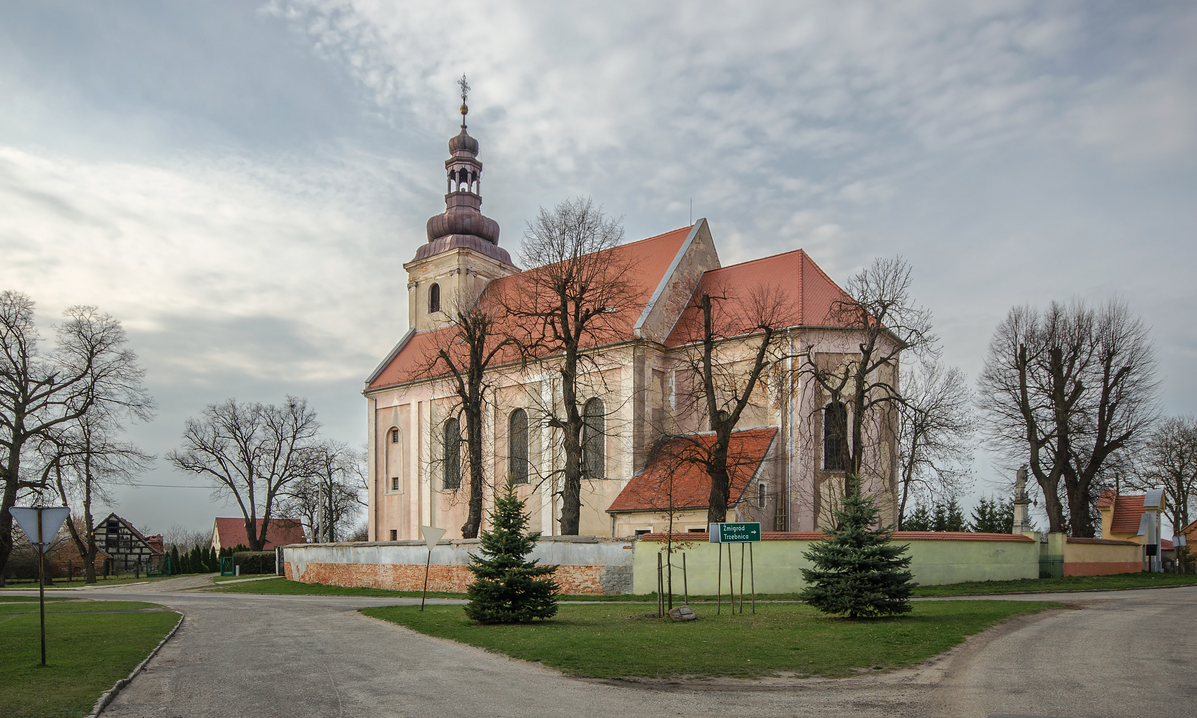 Powidzko, kościół par. p.w. św. Jana Chrzciciela, kon. XVIII